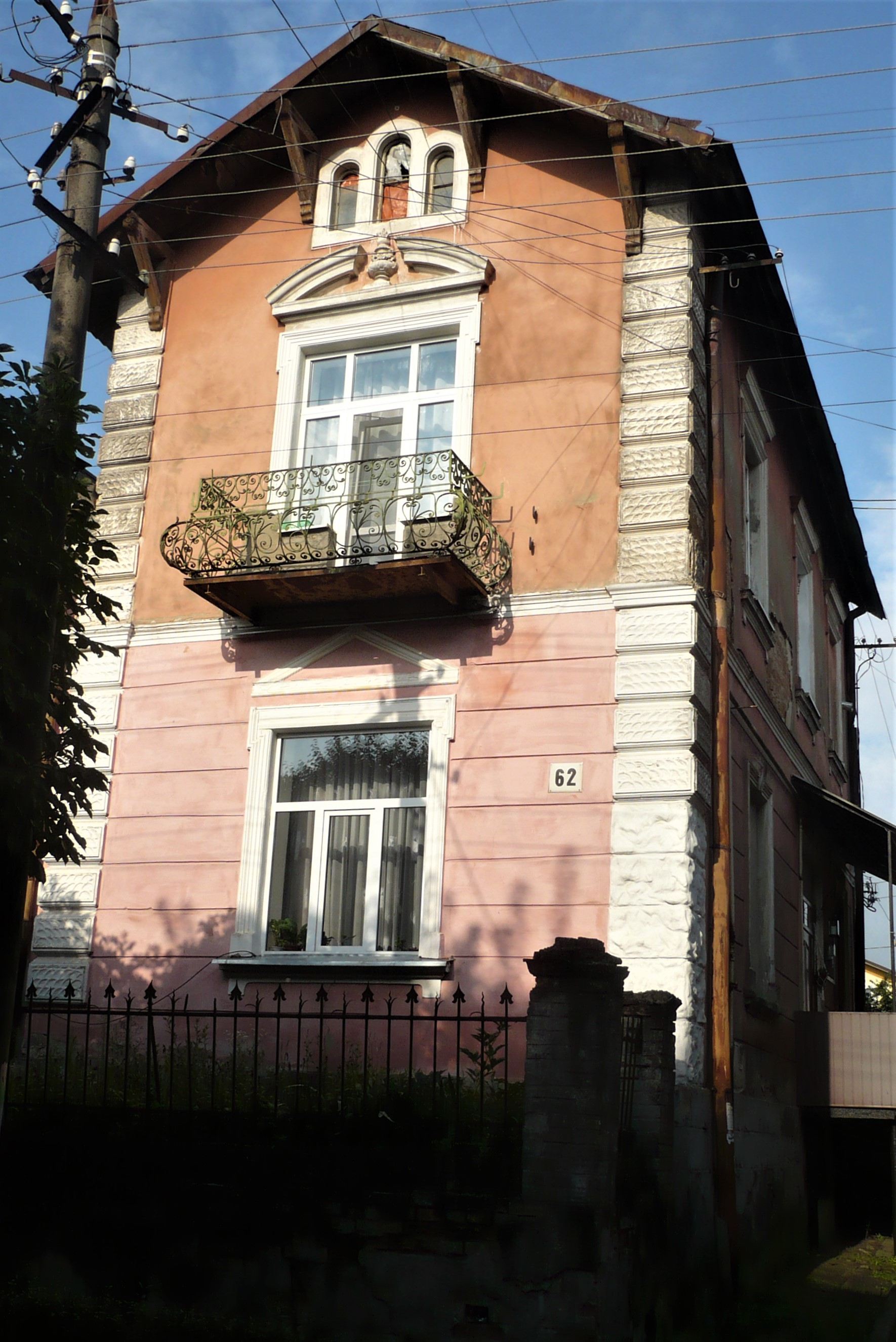 Kamienica w Złoczowie